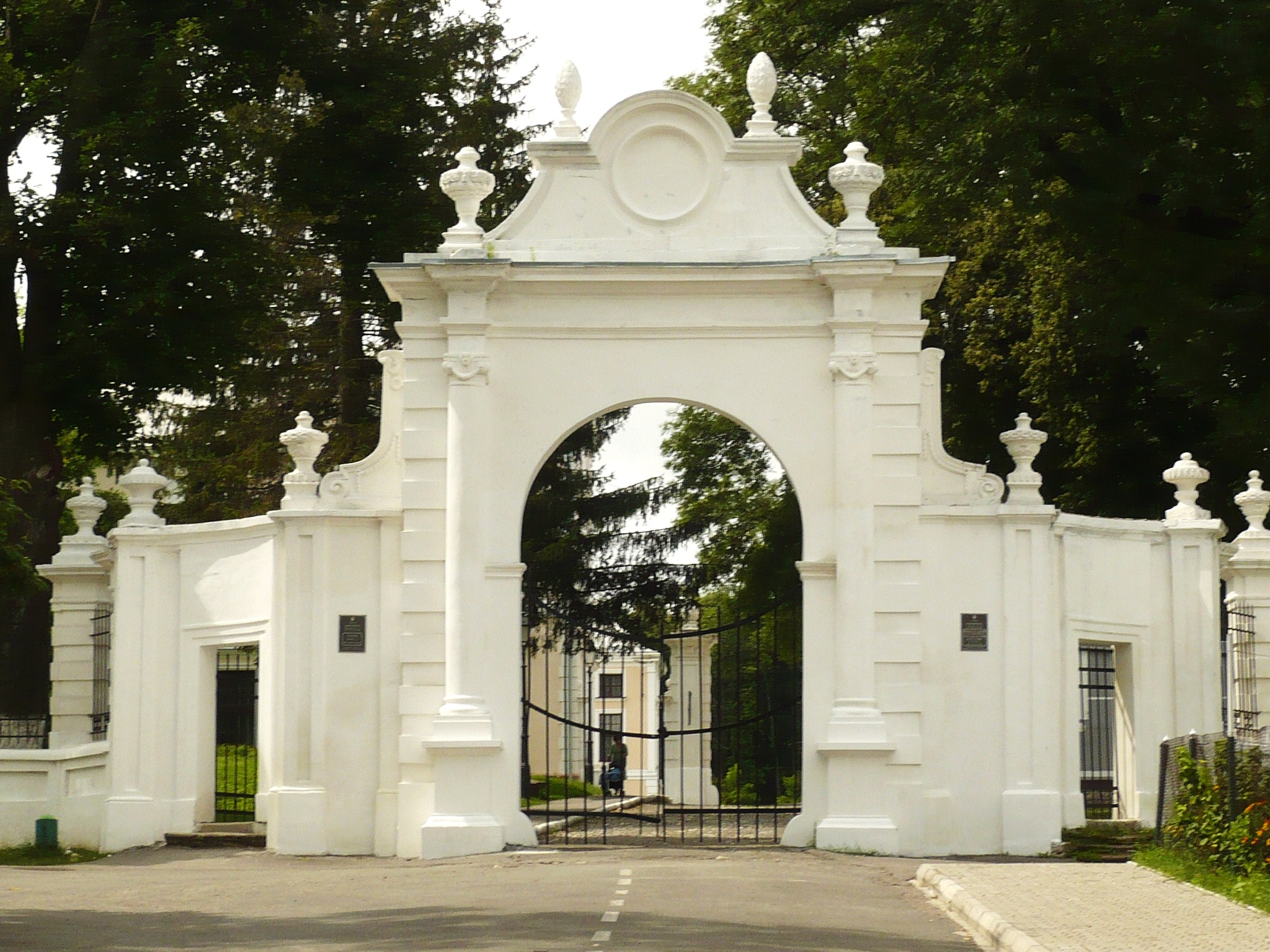 Wiśniowiec, brama do pałacu